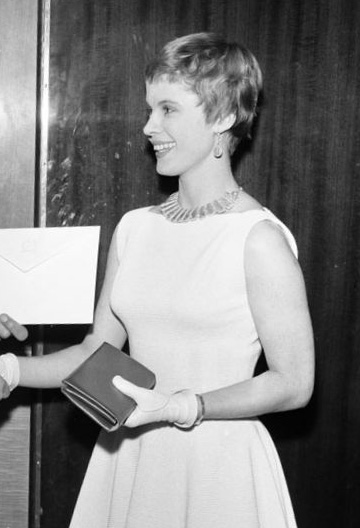 Skådespelerskan Bibi Andersson